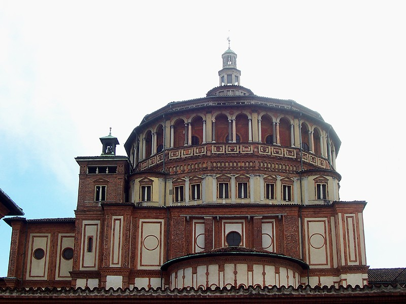 Milano - Tribuna del Bramante della Chiesa di S. Maria delle Grazie